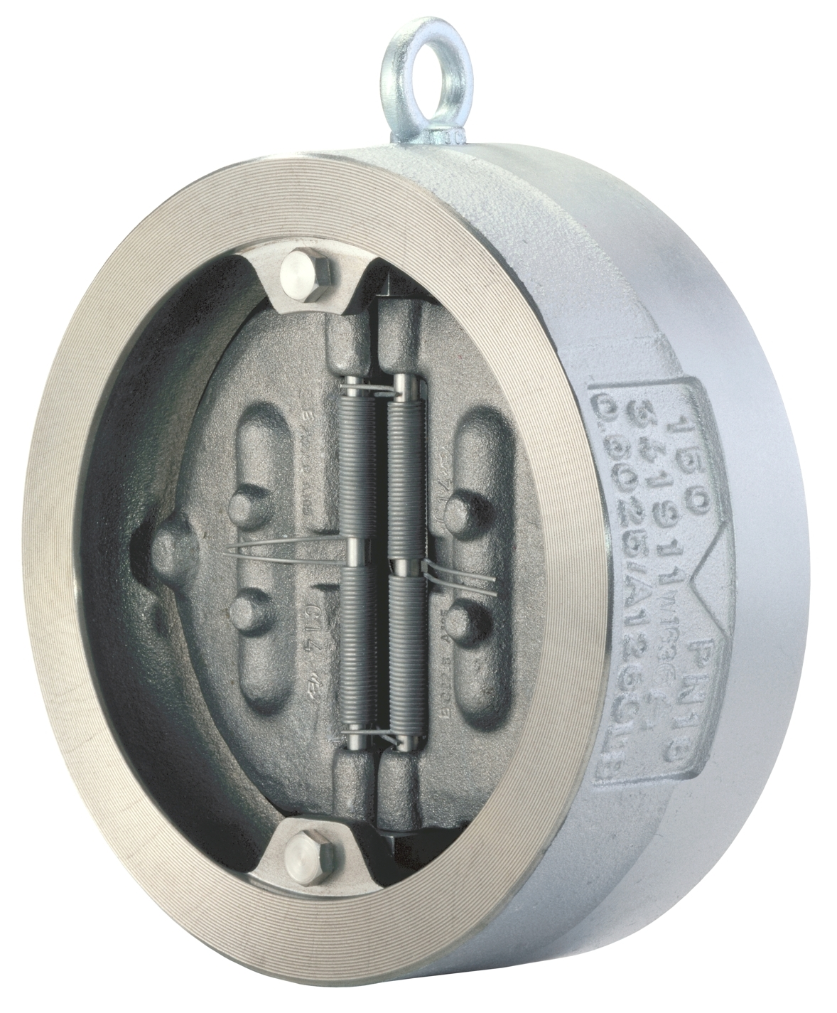 Двухстворчатый клапан